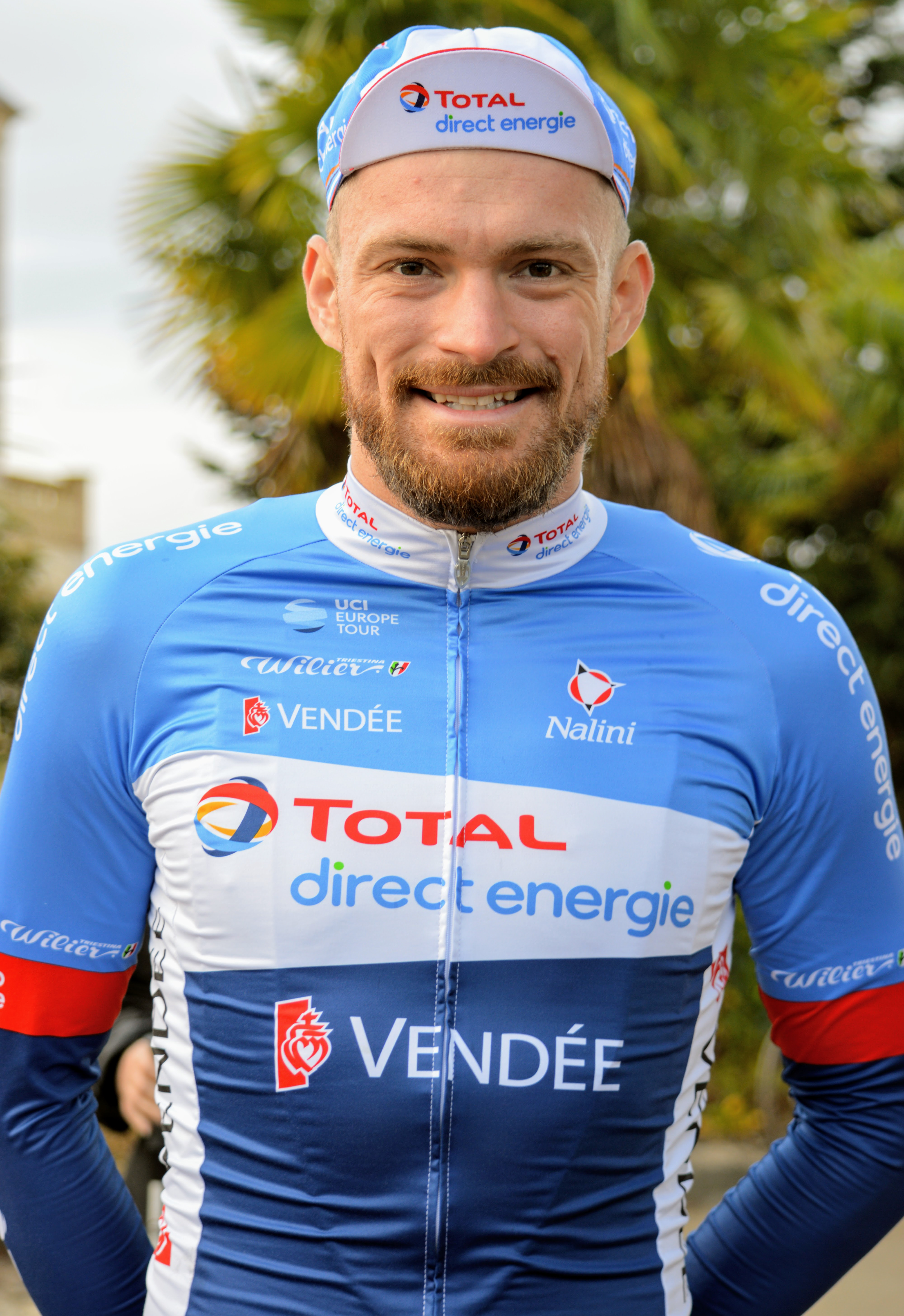 Adrien PETIT - Octobre 2019